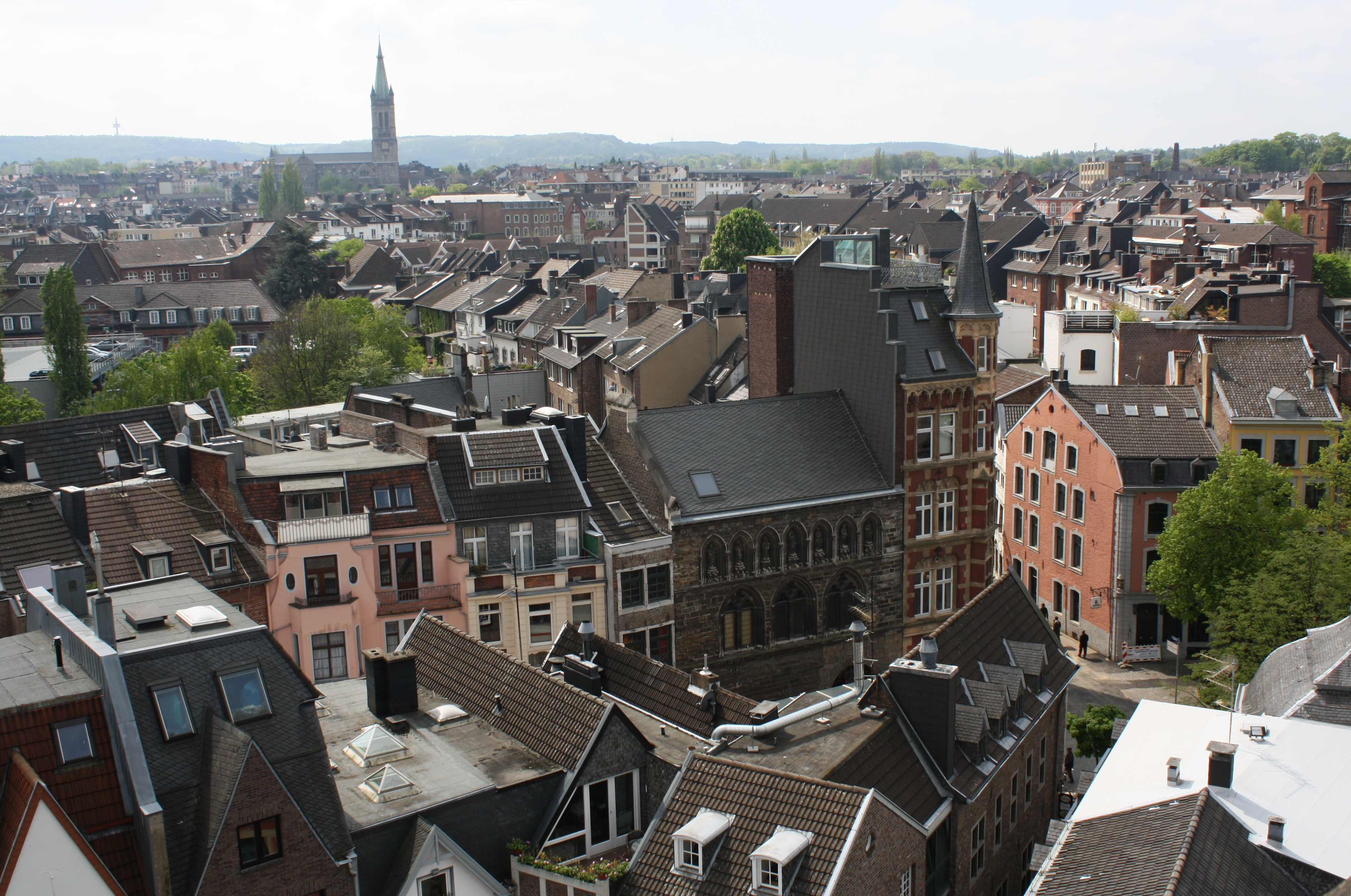 Blick über Aachen vom Dach des Aachener Doms aus